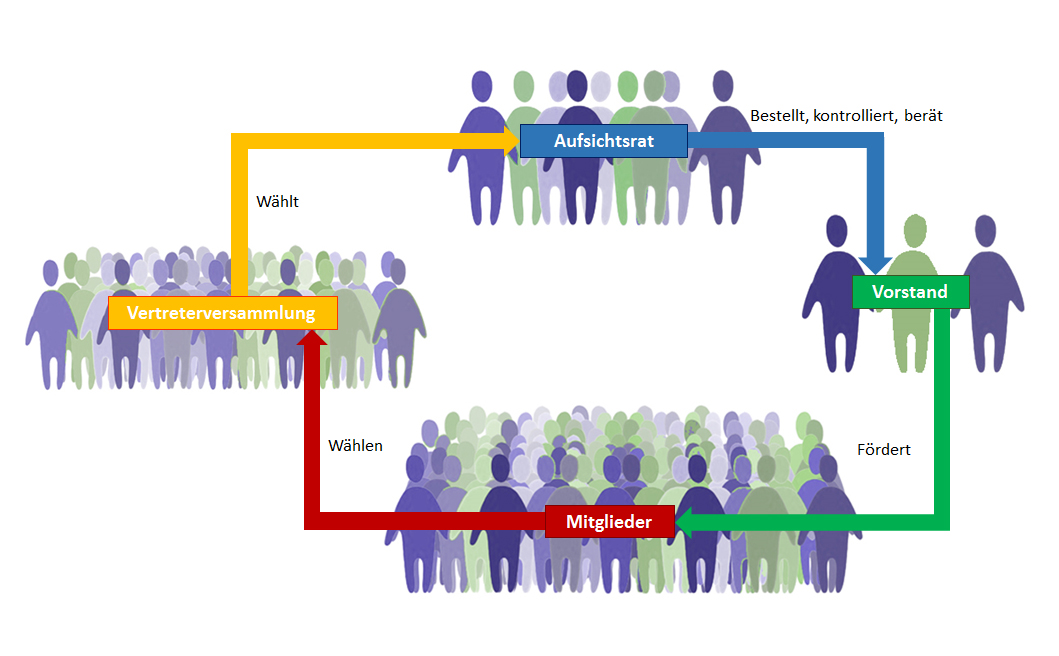 Diagramm der Organisationsstruktur einer großen Genossenschaft